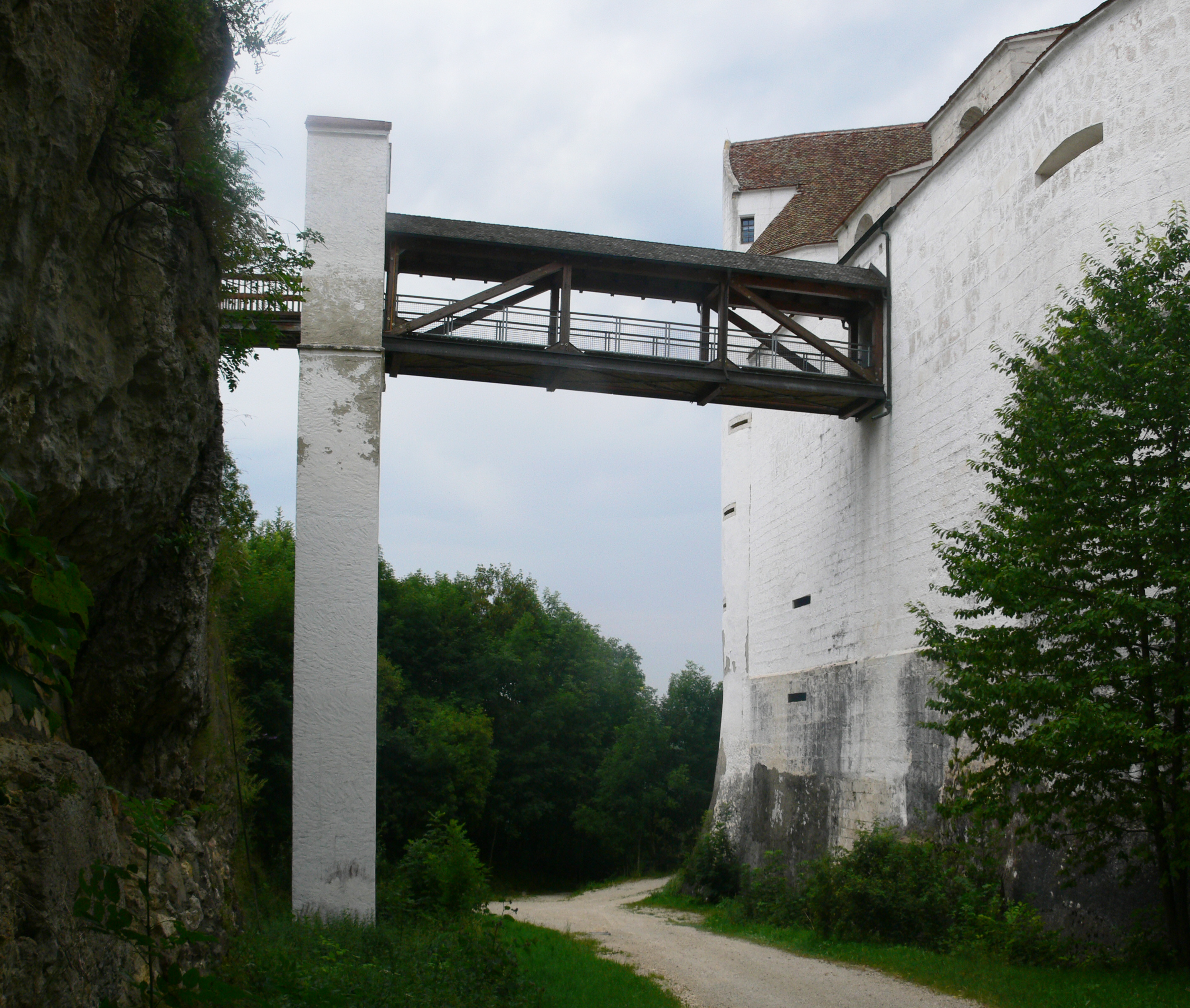 Burg Wildenstein bei Leibertingen Innerer Burggraben